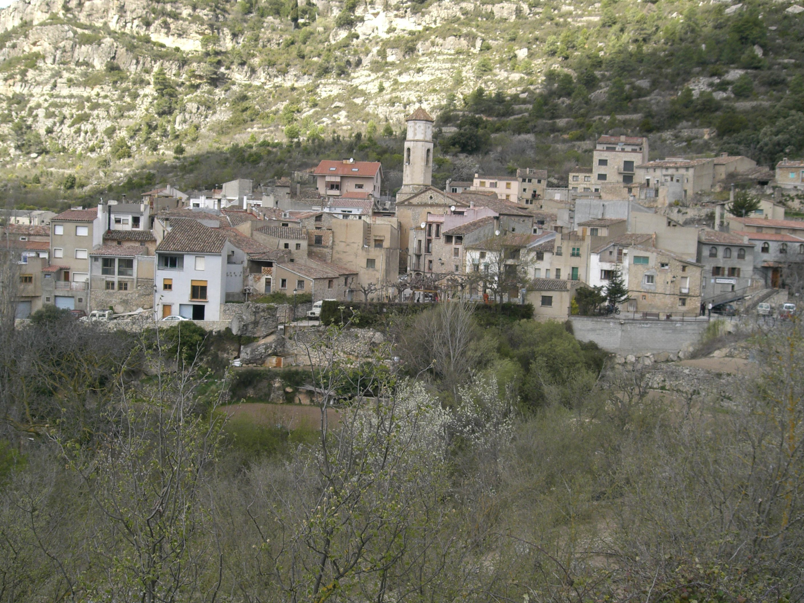 Foto d'Arbolí